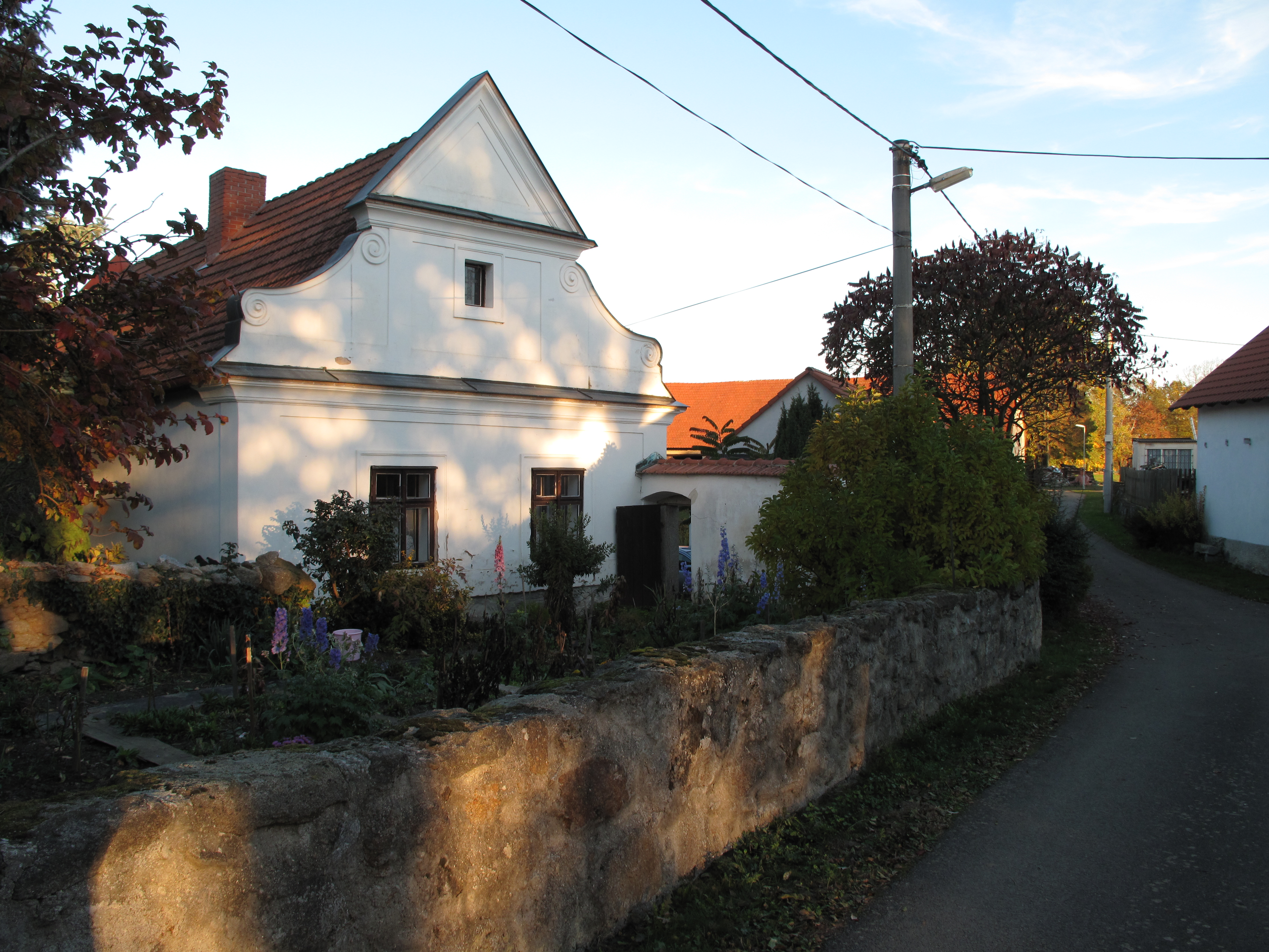 Dům v Boru. Okres Příbram, Česká republika.